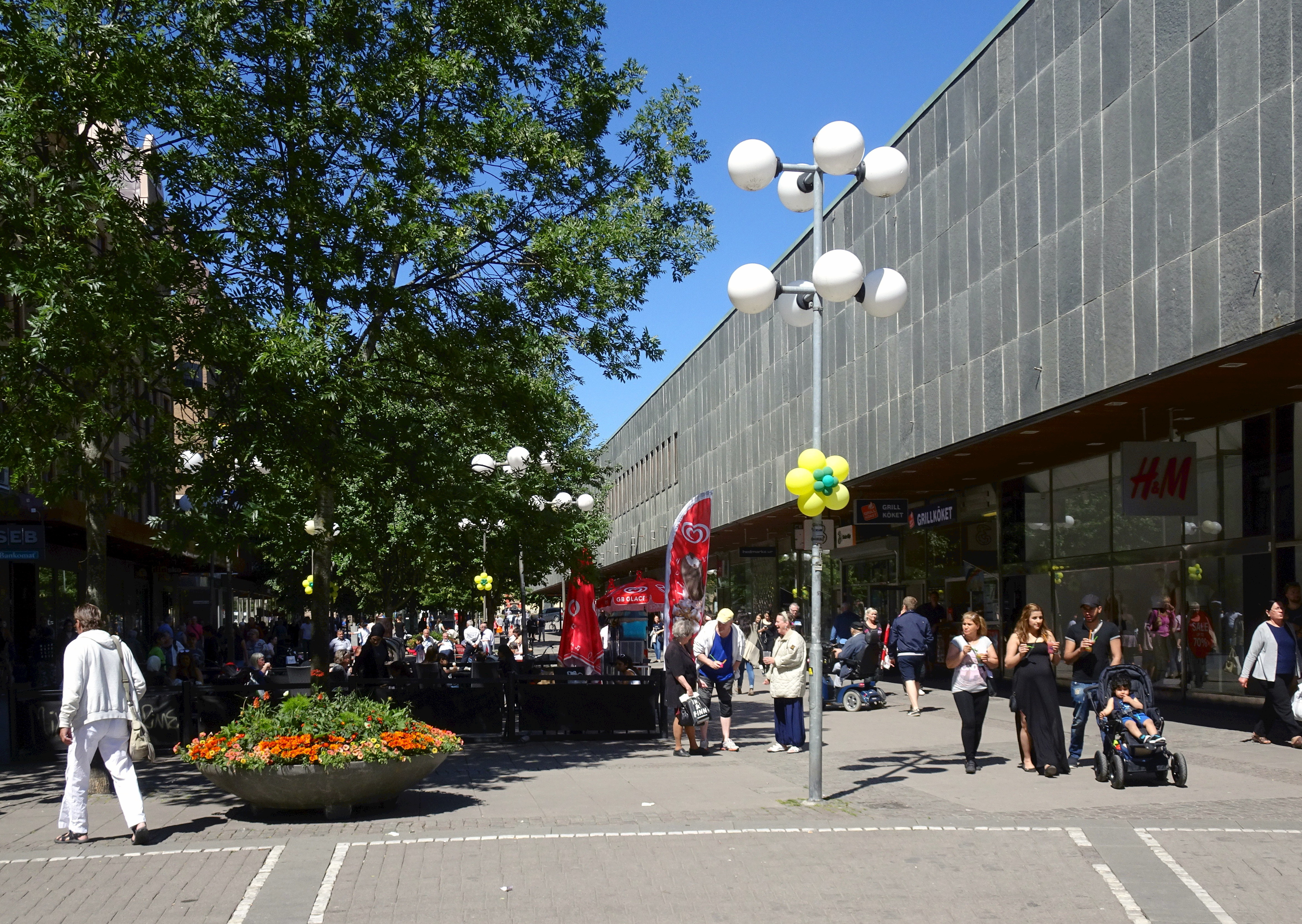 Storgatan, Södertälje mot norr med gamla EPA varuhuset t.h.